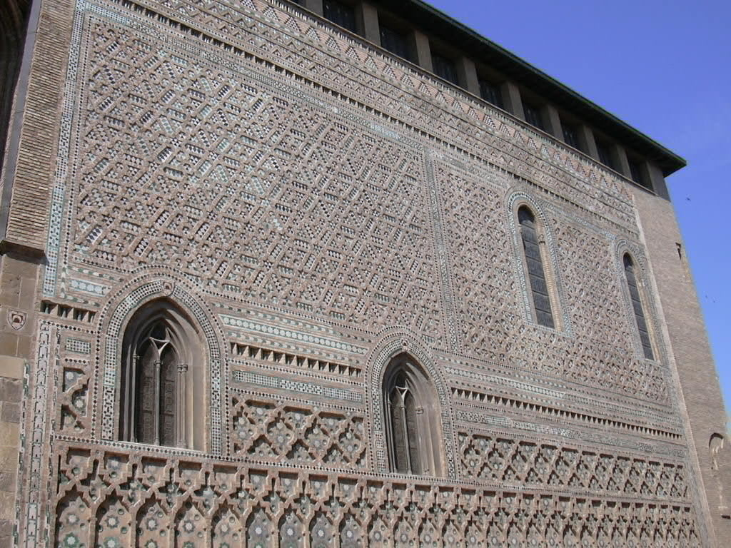 La Seo, pared de la Parroquieta